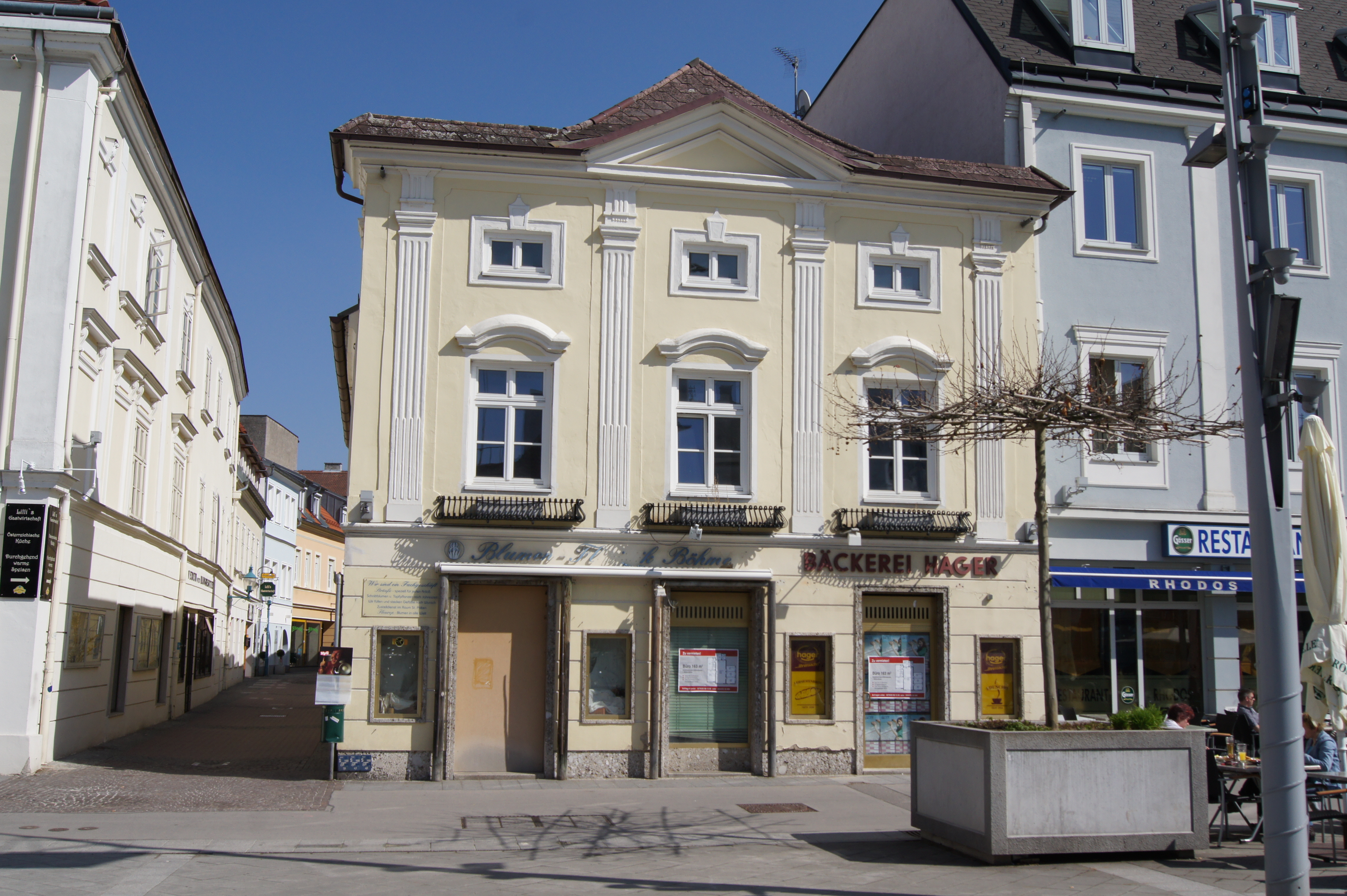 Ehemaliges Bürgerhaus am Rathausplatz in St. Pölten